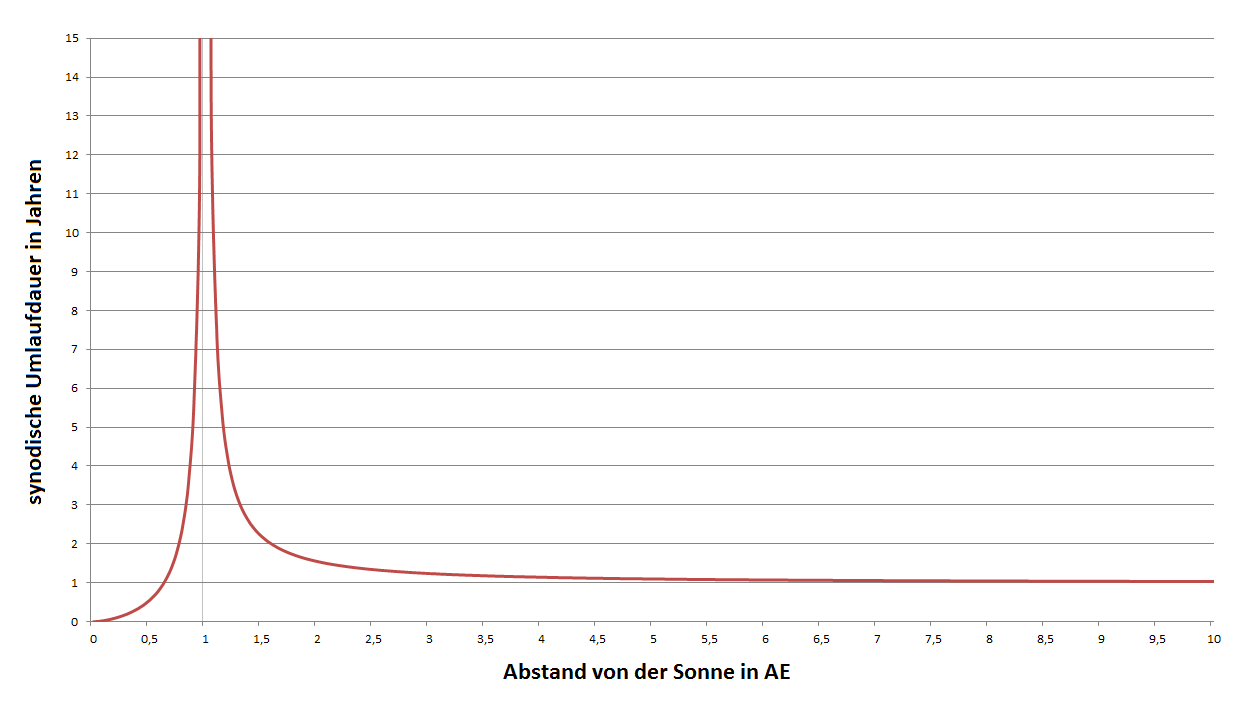 Geht man von Kreisbahnen aus, ist es möglich, die synodische Periode eines Körpers im Sonnensystem in Abhänigkeit seines Abstands von der Sonne darzustellen. Körper, welche die Sonne mit einer sehr großen Halbachse umrunden haben eine synodische Periode von etwa 1 Jahr. Körper mit einer großen Halbachse kleiner als etwa 0,7 AE haben eine synodische Periode von kleiner als einem Jahr. Körper, deren große Halbachse sich zwischen etwa 0,7 AE und 1 AE befindet haben eine synodische Periode von mehr als einem Jahr, wobei die Periode stark zunimmt, je näher der Wert seiner großen Halbachse dem der Erde kommt. Zwischen 1 AE und und größeren Werten der großen Halbachse gilt dies analog.